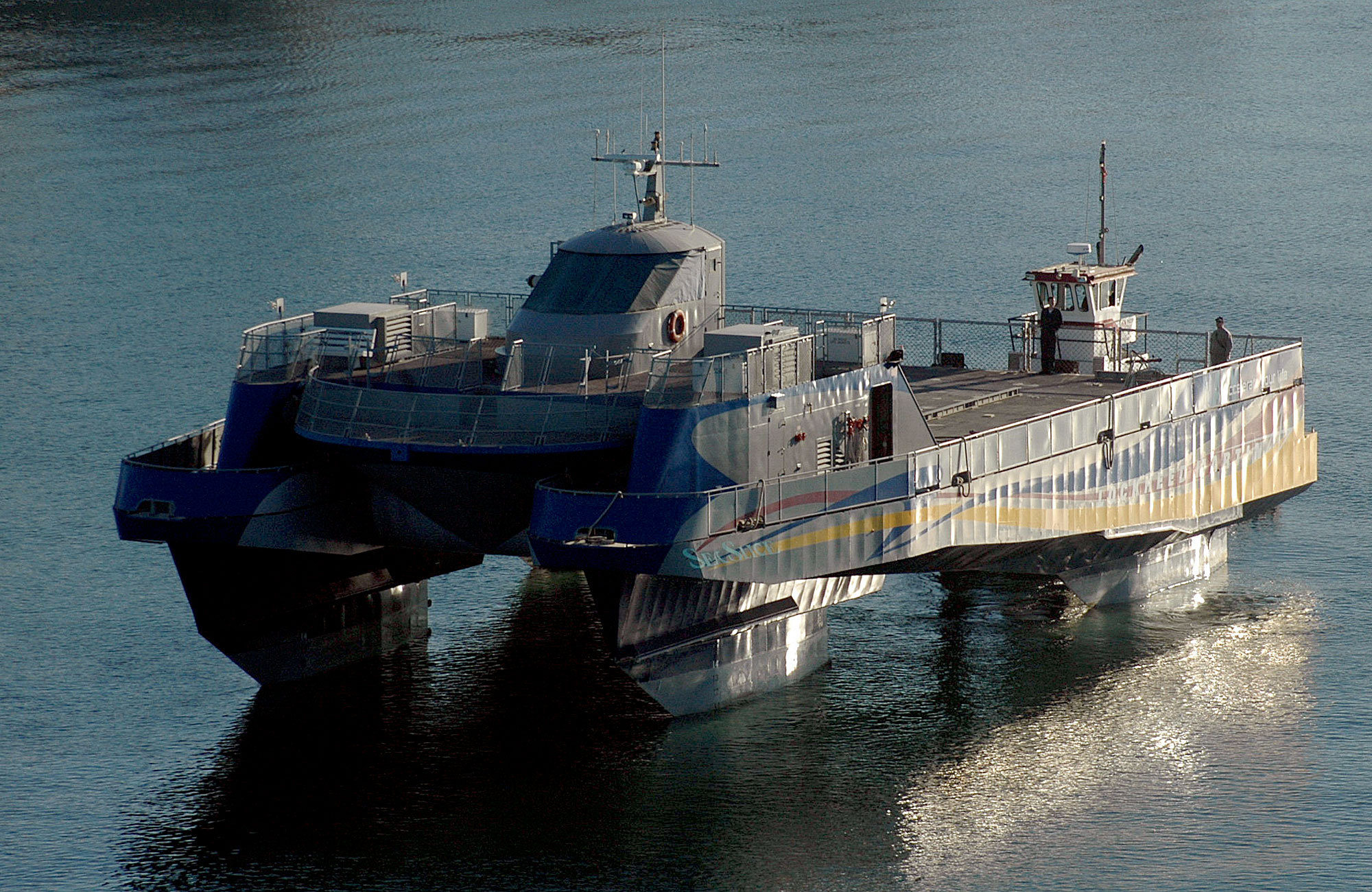 USN experimental Small water area vessel.